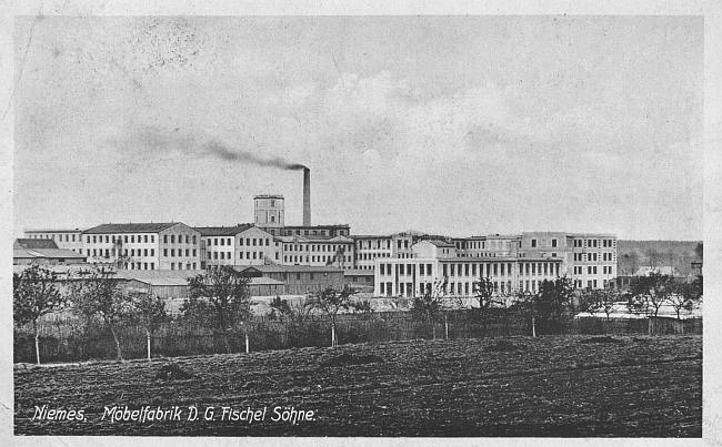 Továrna Fischel-Falcon v Mimoni